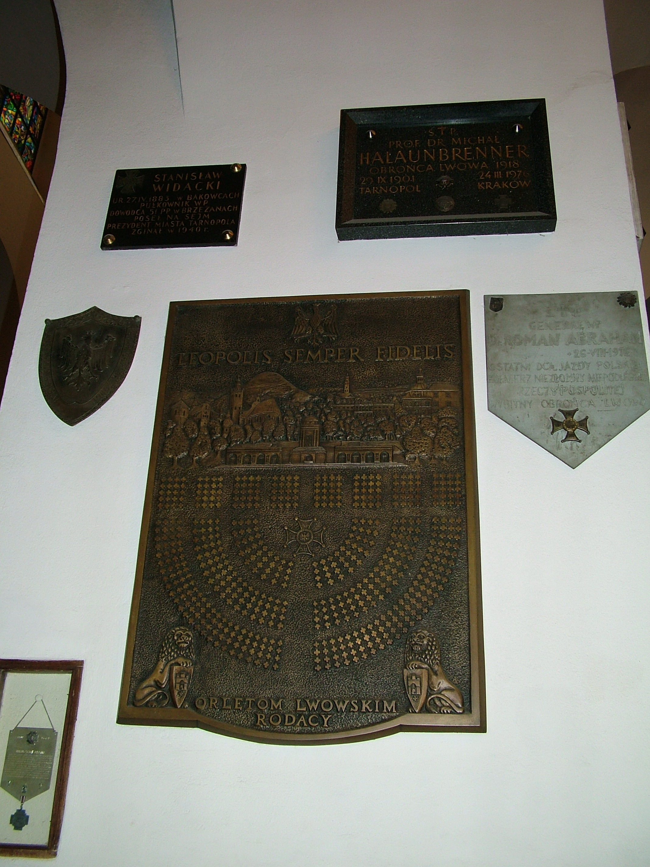 Tablica Orląt Lwowskich w bazylice na Jasnej Górze